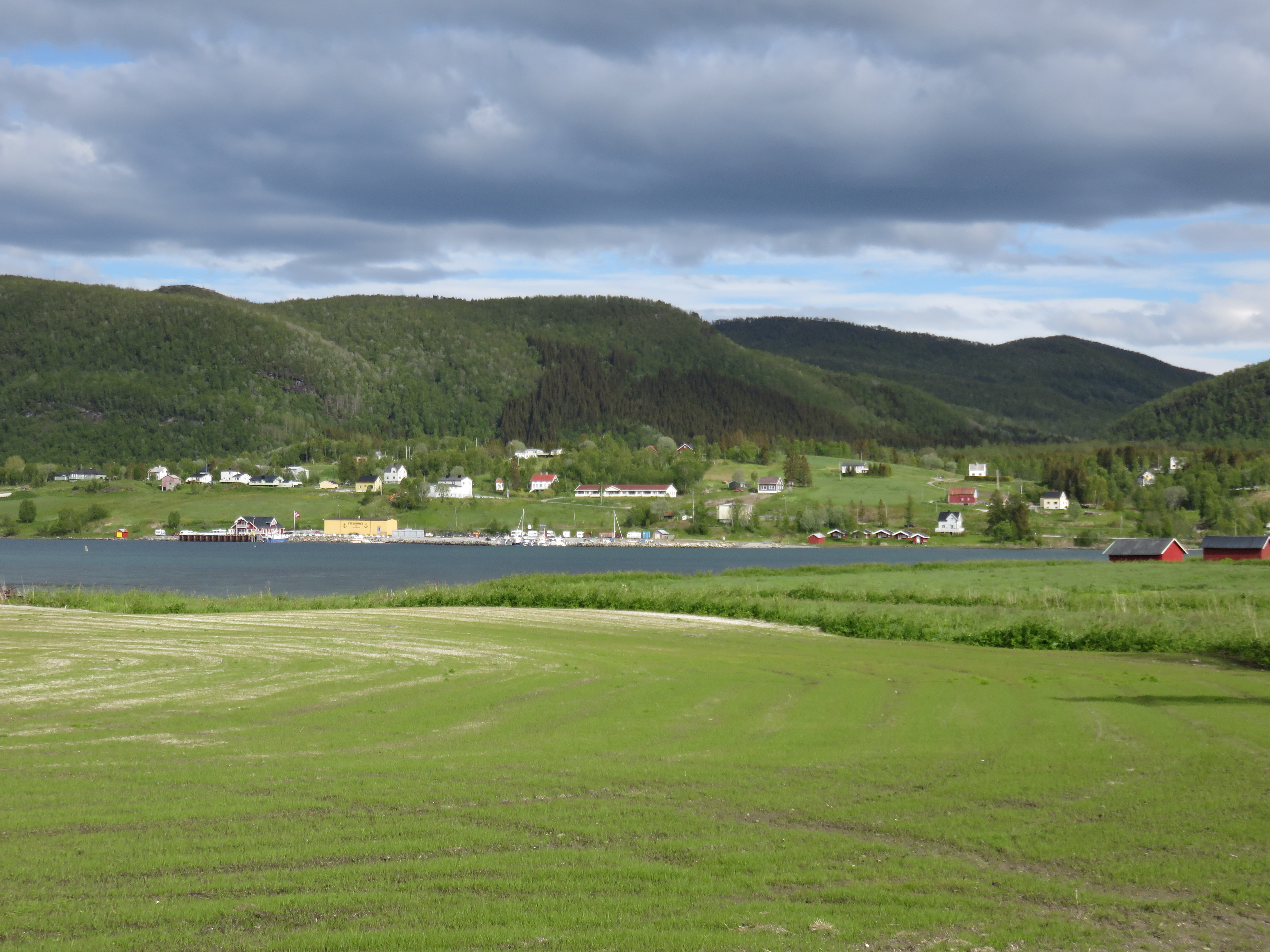 Kjeldebotn i Ballangen kommune.